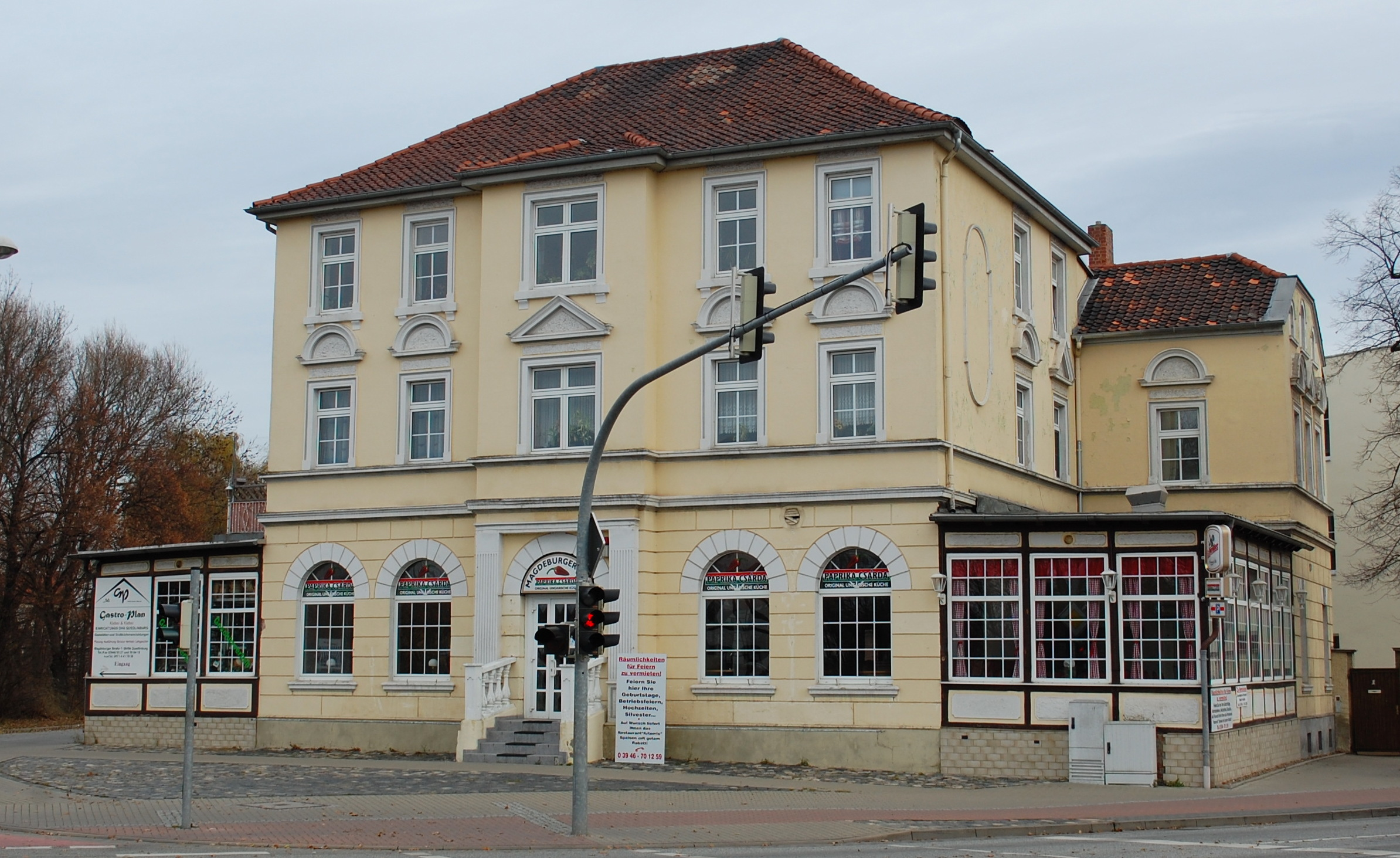 Haus Magdeburger Straße 1 in Quedlinburg